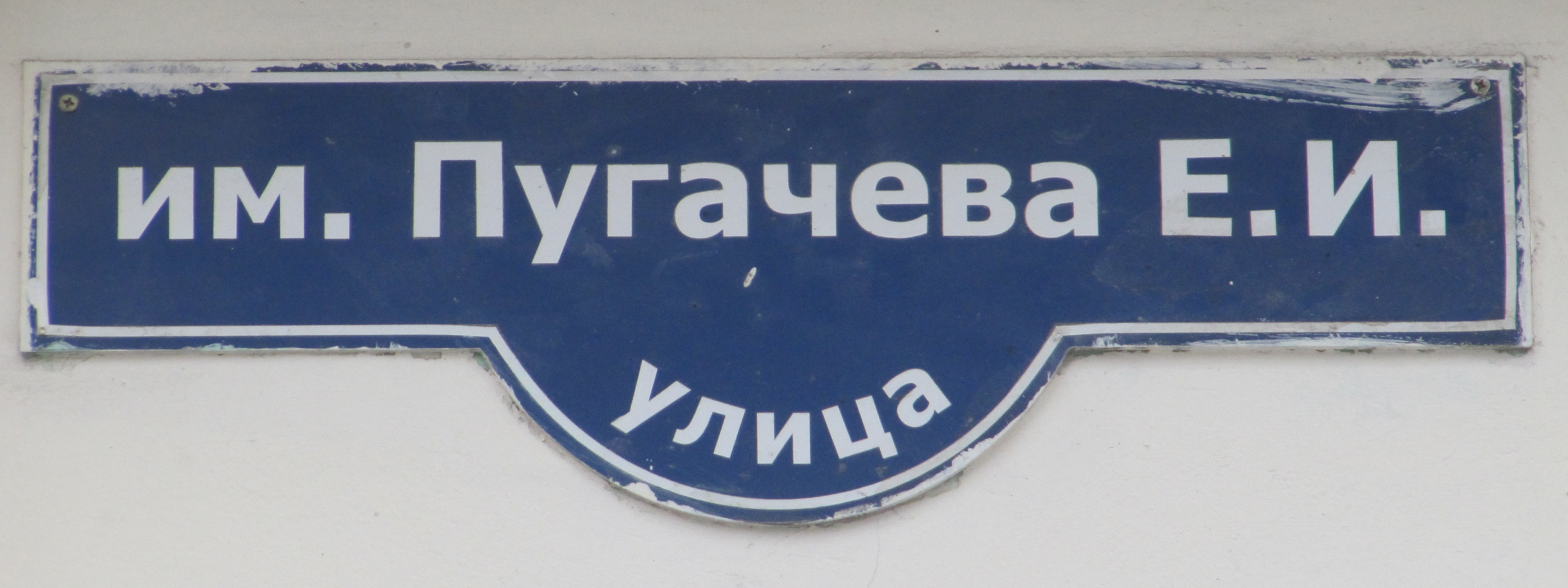 Ул. Пугачёва Е.И. Саратов